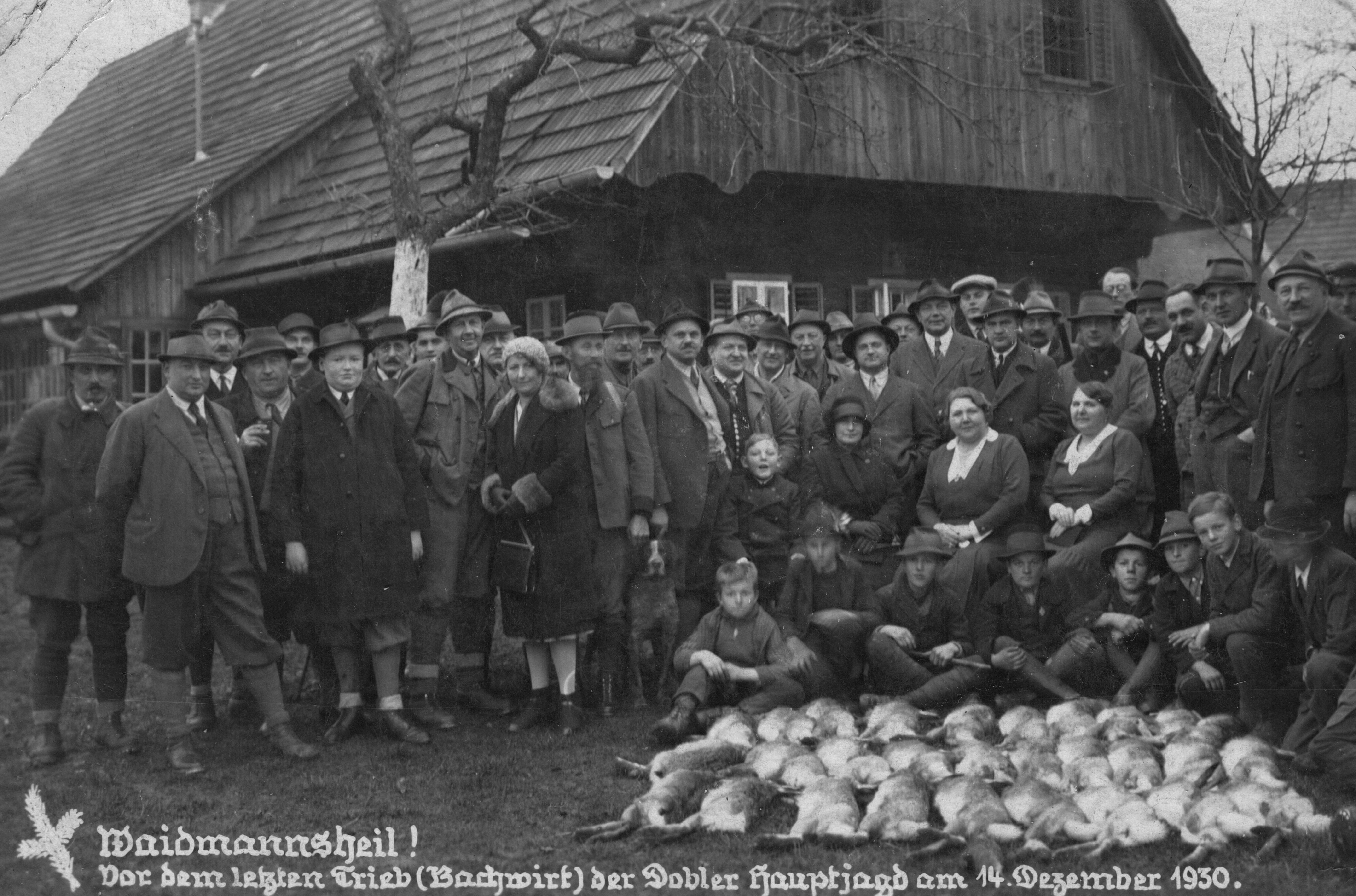 Hausjagd in Dobl (Steiermark) in den 1930er-Jahren